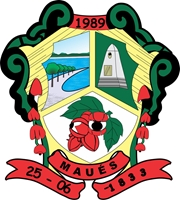 Brasão de Mués,Amazonas.